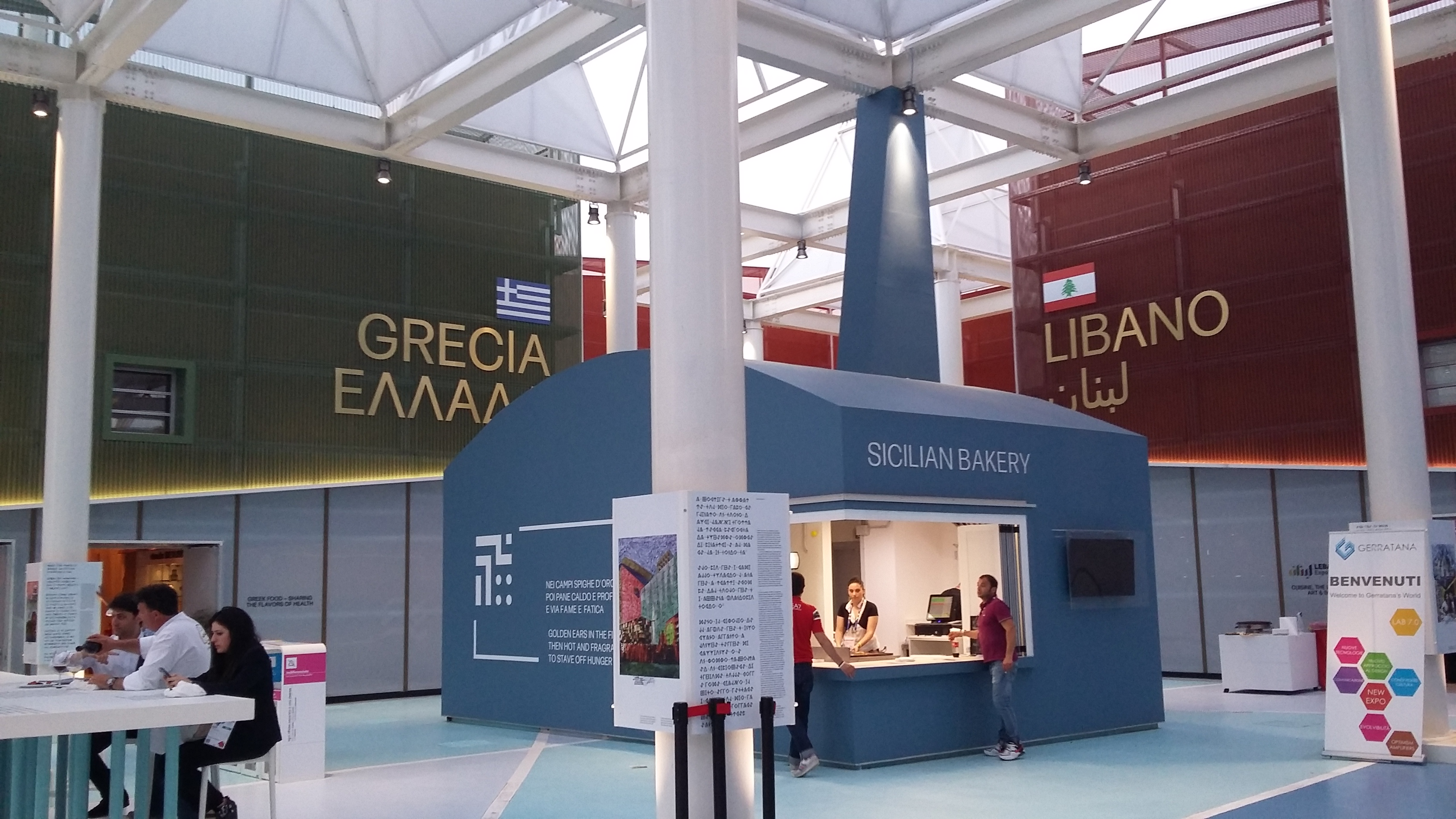 Cluster Bio-Mediterrameo ad Expo 2015 Milano